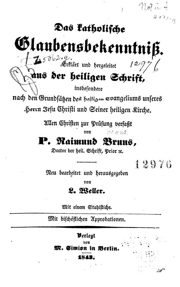 Titelseite Raimund Bruns OP (1706-1780): Das katholische Glaubensbekenntniß (1768), Neuausgabe 1843 durch L. Weller